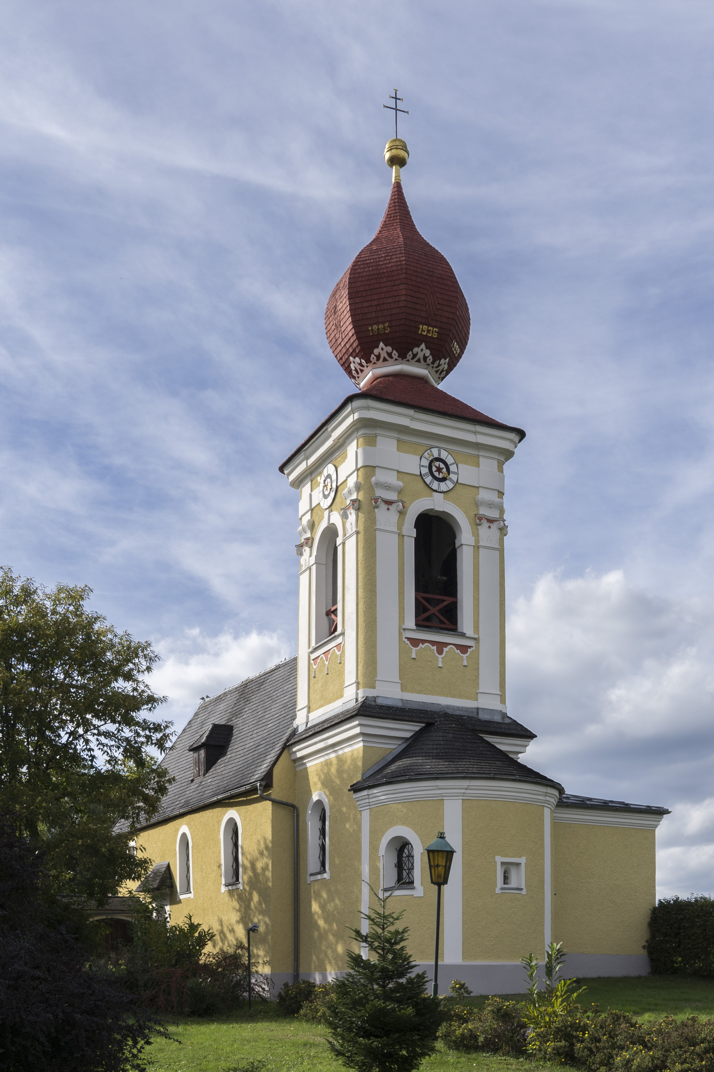 Kirche, Pfaffing